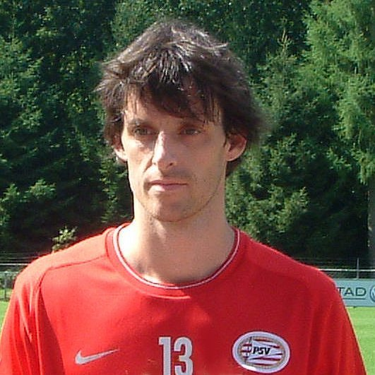 Jérémie Bréchet, PSV Eindhoven. Op de Herdgang